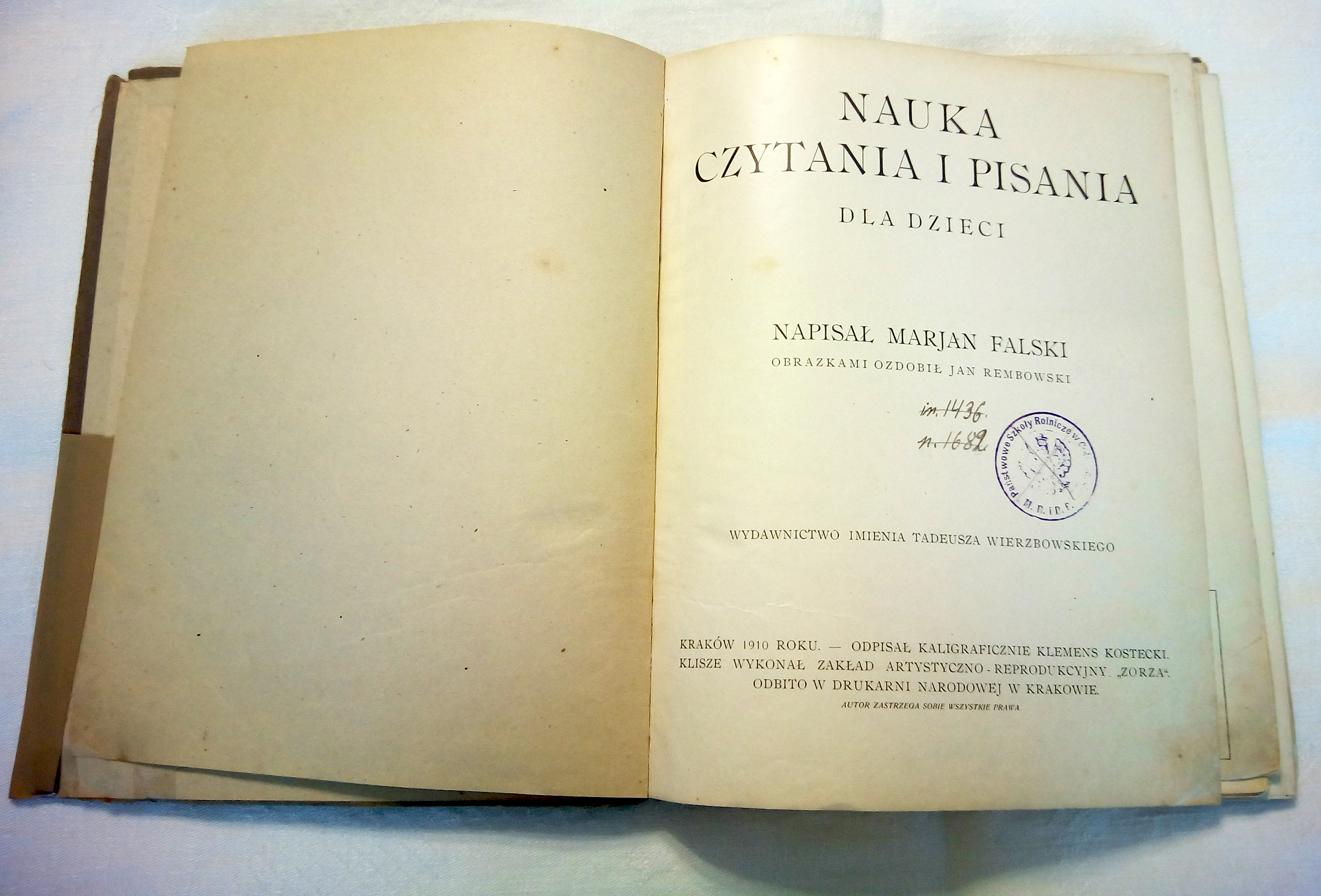 Strona tytułowa z pierwszego wydania elementarza Mariana Falskiego, wydanie z 1910 roku z ilustracjami Jana Rembowskiego